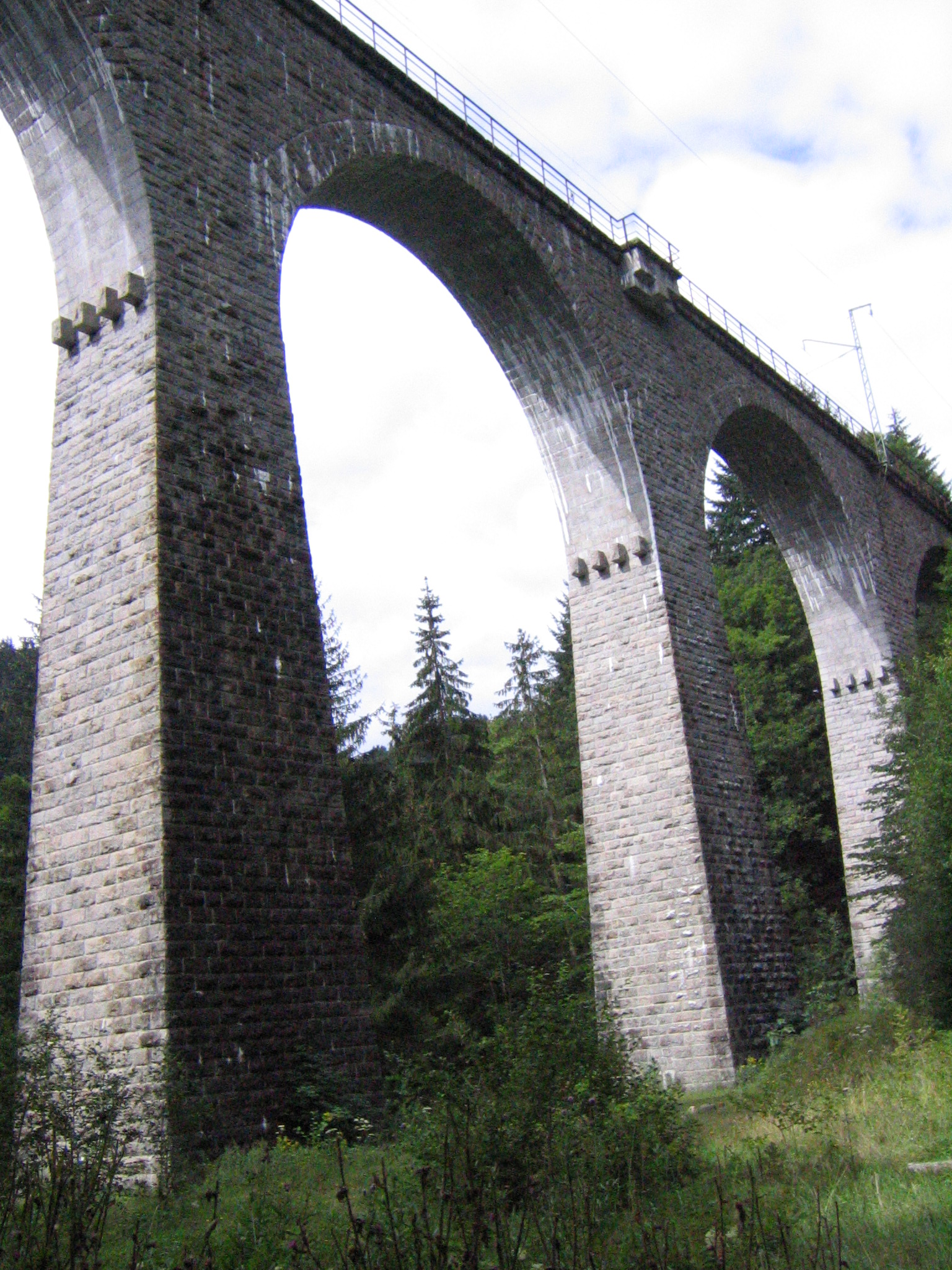 Ravennaviadukt (2007).